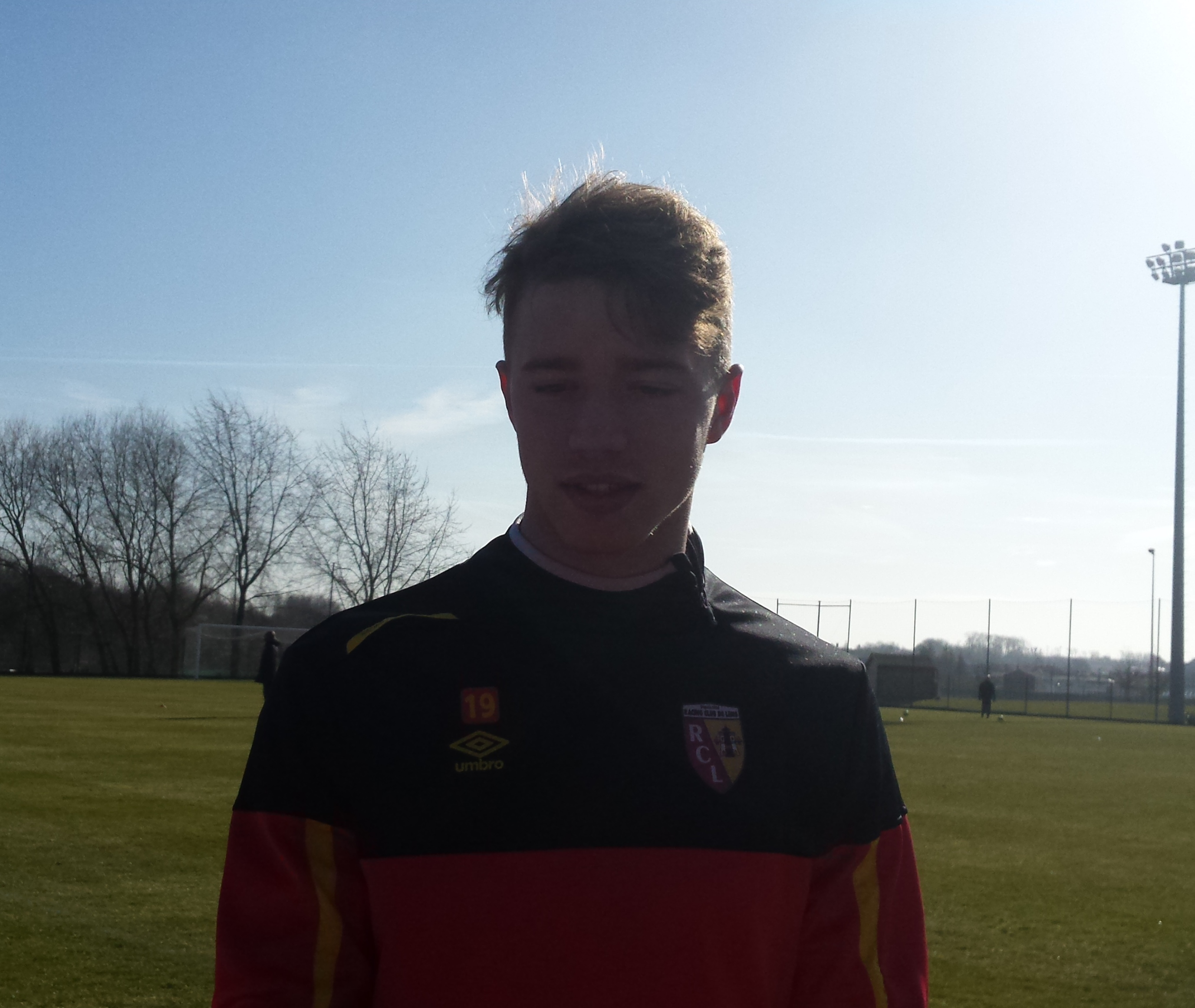 Baptiste Guillaume lors d'un entraînement public du Racing Club de Lens, le 5 mars 2015, sur le terrain San Siro du Centre technique et sportif de La Gaillette.